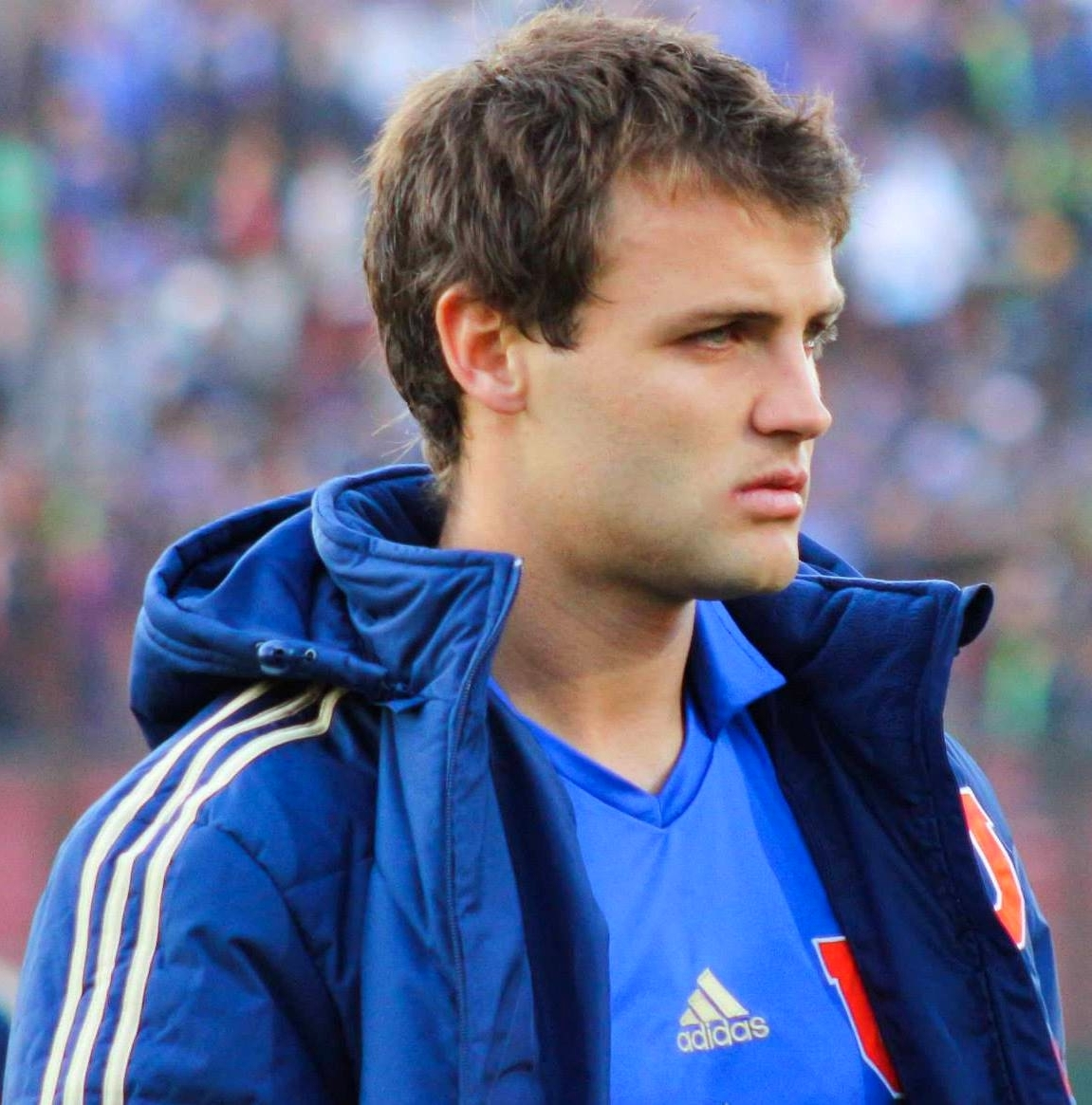 Defensa Club Universidad de Chile